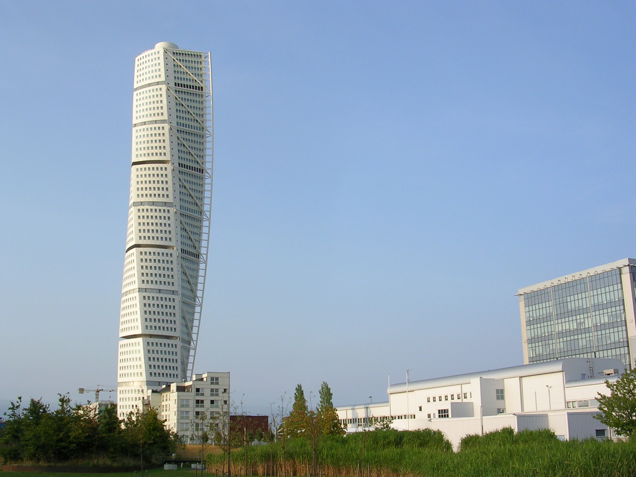 Turning Torso in Malmö. Date: September 2005 Author: Väsk